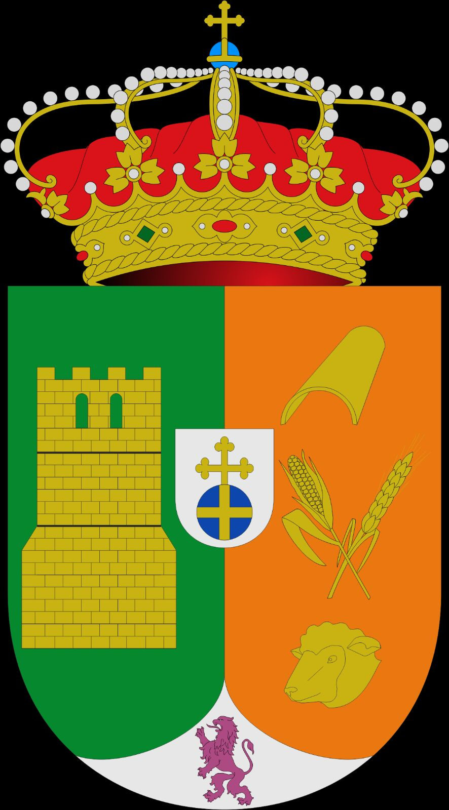 Escudo